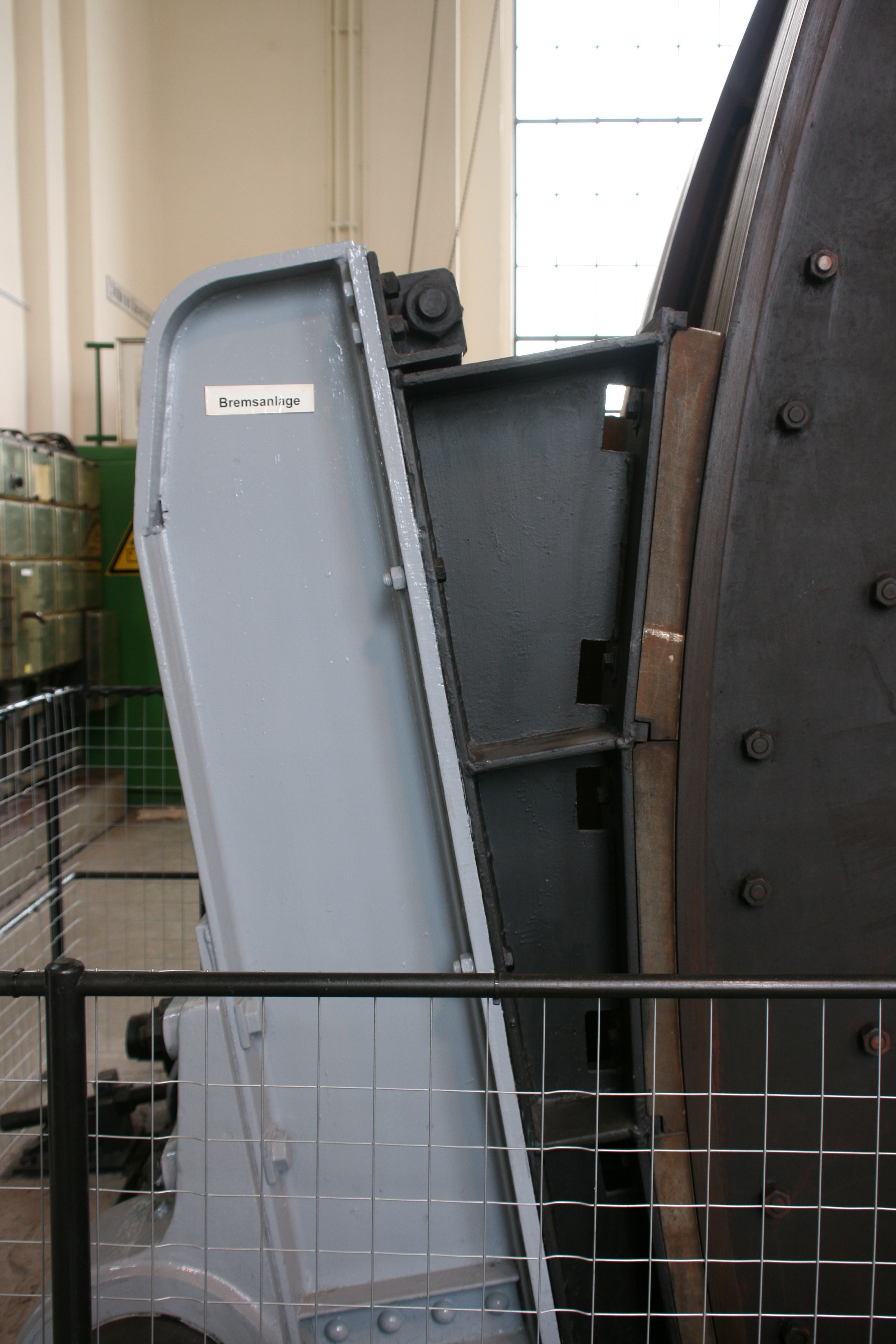 Museum: Südliches Maschinenhaus von Zeche Consolidation Schacht 9 in Gelsenkirchen